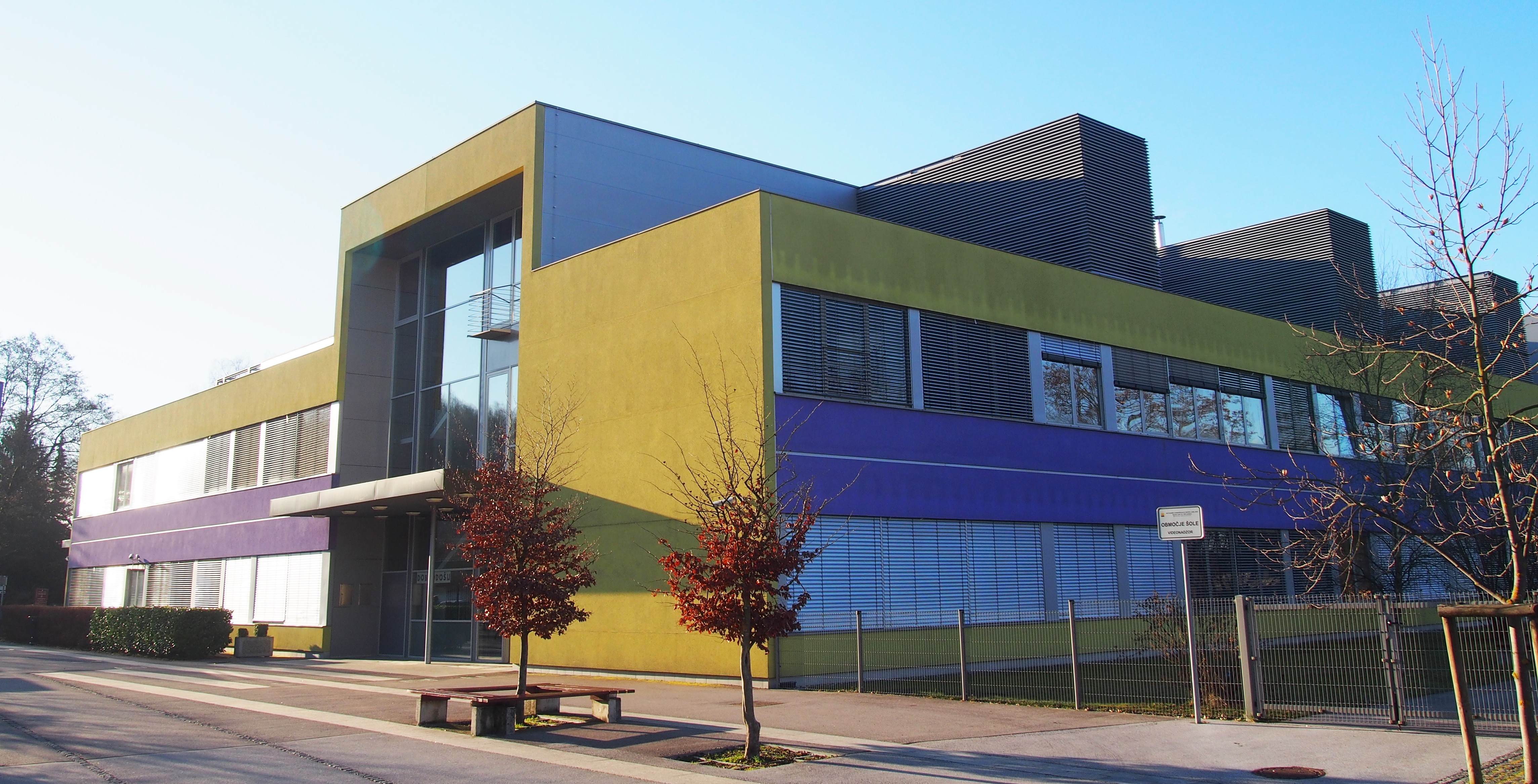 Zavod BIC Ljubljana na lokaciji Ižanska cesta 10